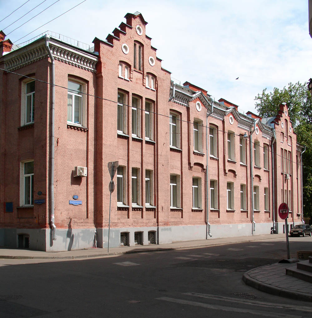 Moscow, corner of Bolshoy Kharitonyevsky and Bolshoy Kozlovsky lanes. Orphanage built in 1895, architect Max Hoeppener, see Historical photo of 1895 RUSSIAN: Москва, старое школьное (приютское) здание на углу Большого Харитоньевского и Большого Козловского переулков, арх. Геппенер, Максим Карлович, cм. Фото 1895